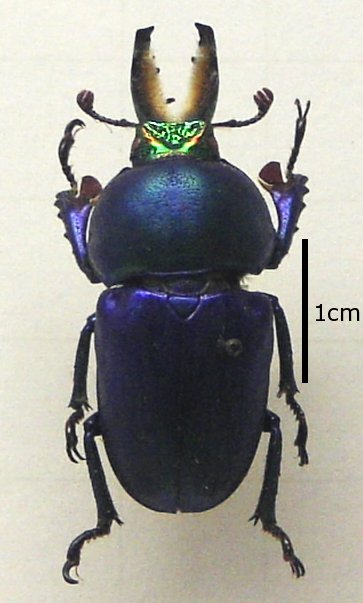 Lamprima latreillei (Lucanidae), mounted specimen from Australia.